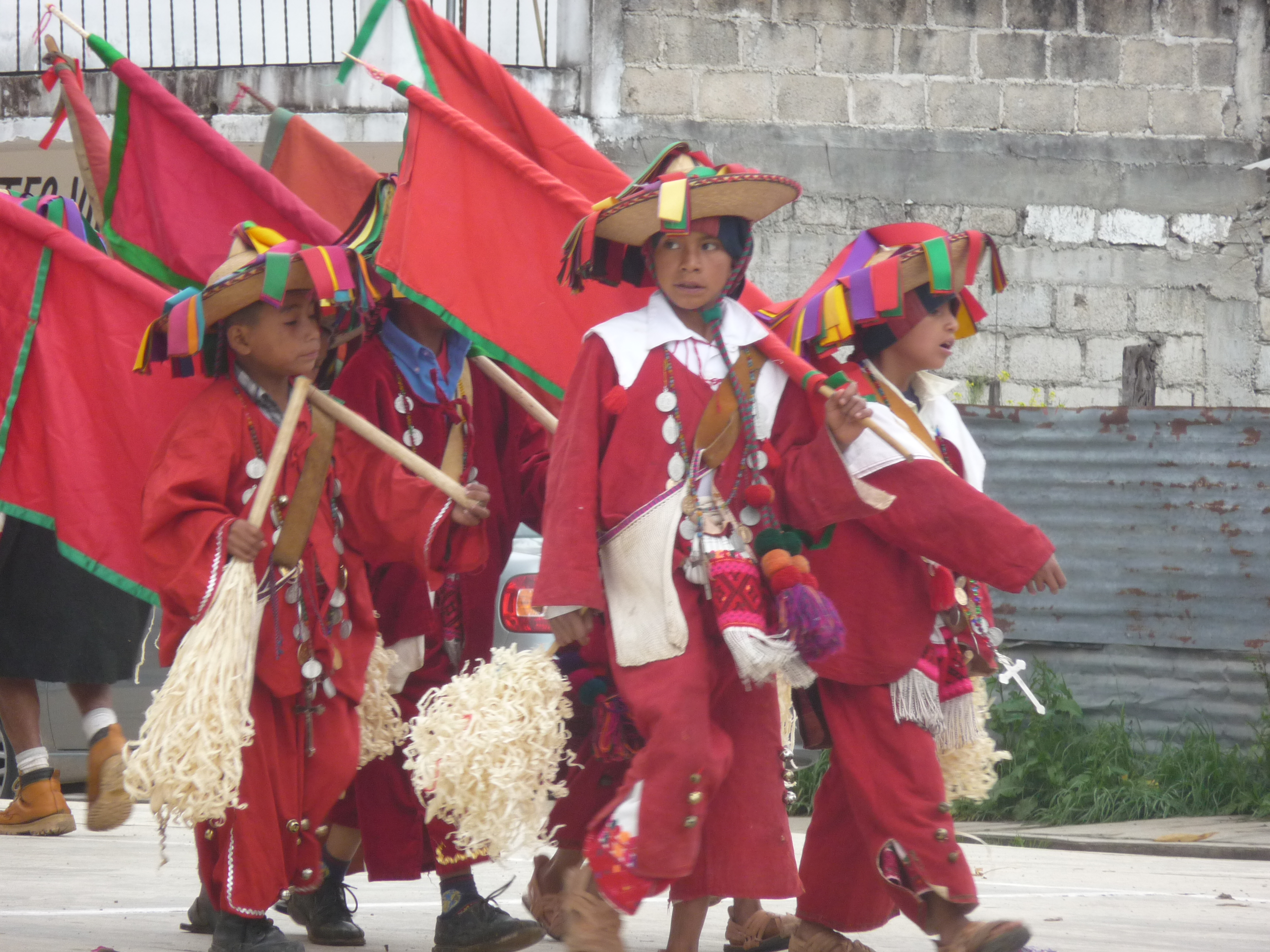 Enfants lors du Carnaval de tenejapa en 2011